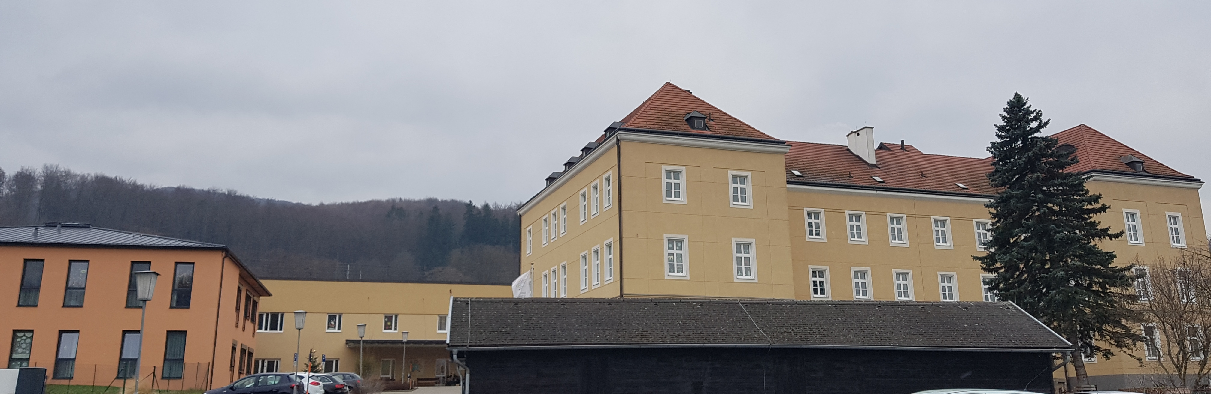 Pflegeheim St. Louise, Barmherzige Schwestern Vinzent Gruppe, Maria-Anzbach